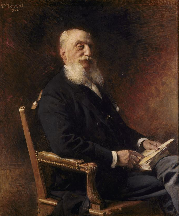 Louis Cahen d'Anvers (1837-1922)